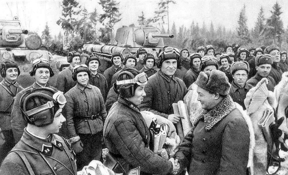 Маршал Х. Чойбалсан вручает подарки советским танкистам